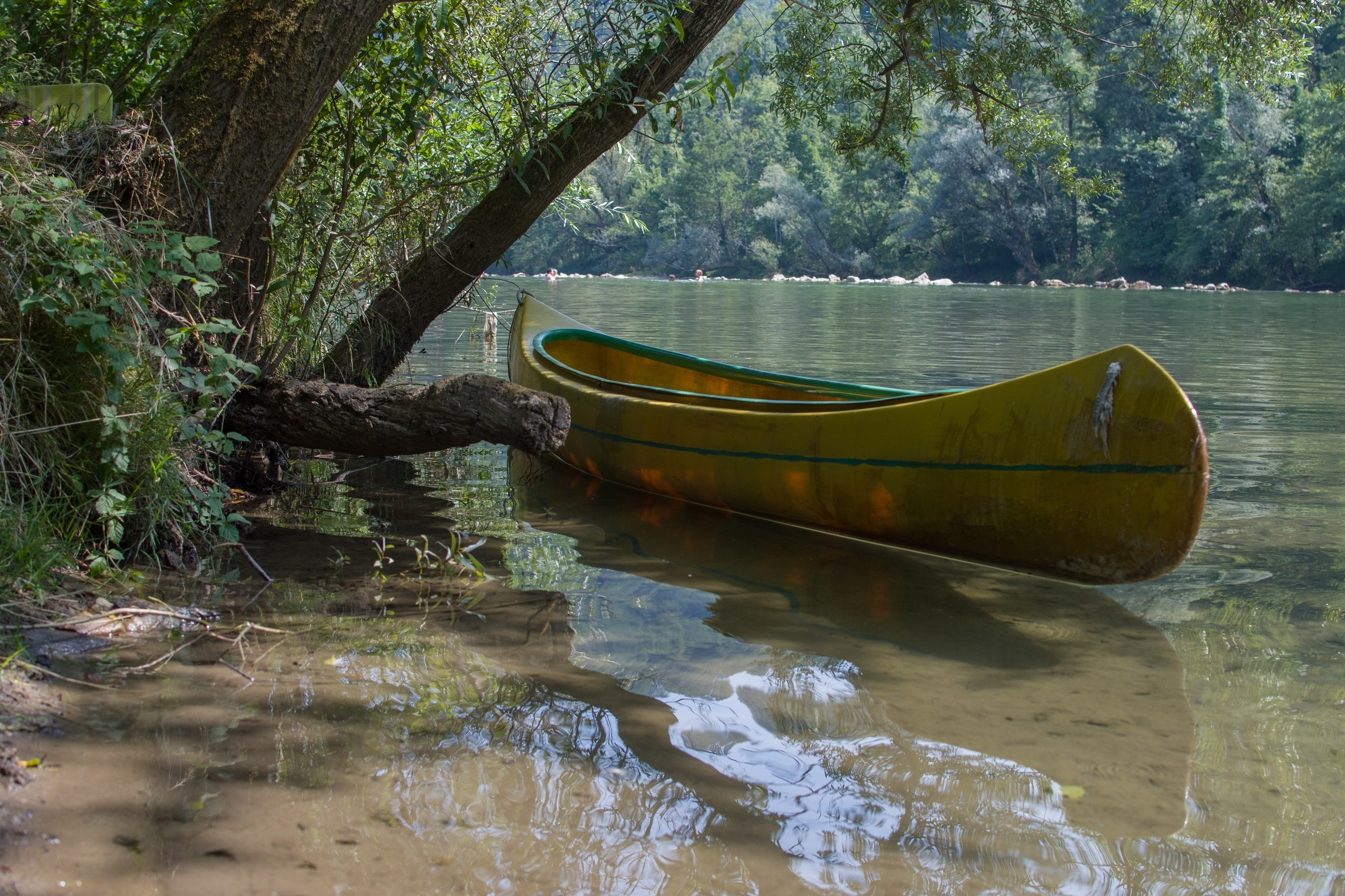 Kolpa River.